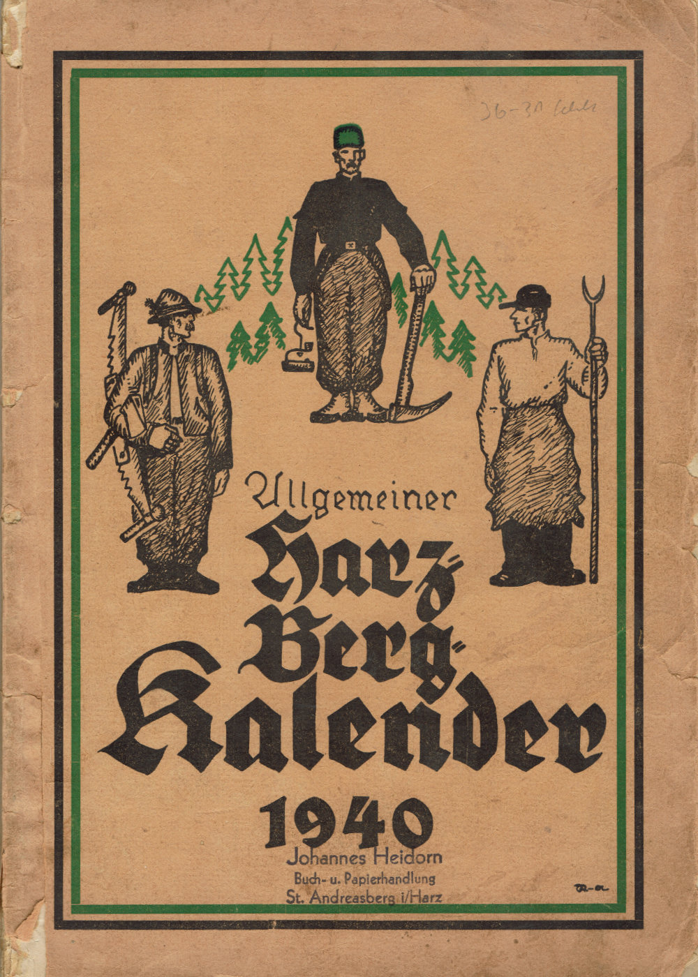 Cover des Allgemeinen Harz-Berg-Kalenders 1940